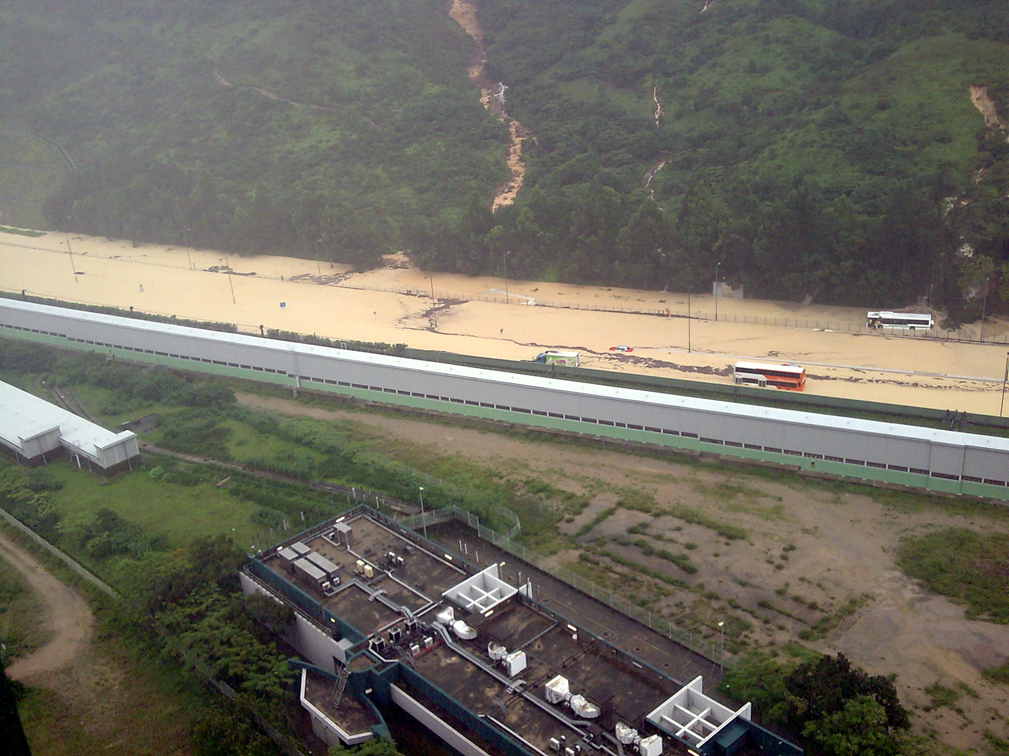 HK Heavy Rain on 2008/06/07 香港六月七日暴雨